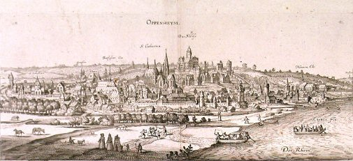 'OPPENHEYM' Ansicht von Joannes Janssonius